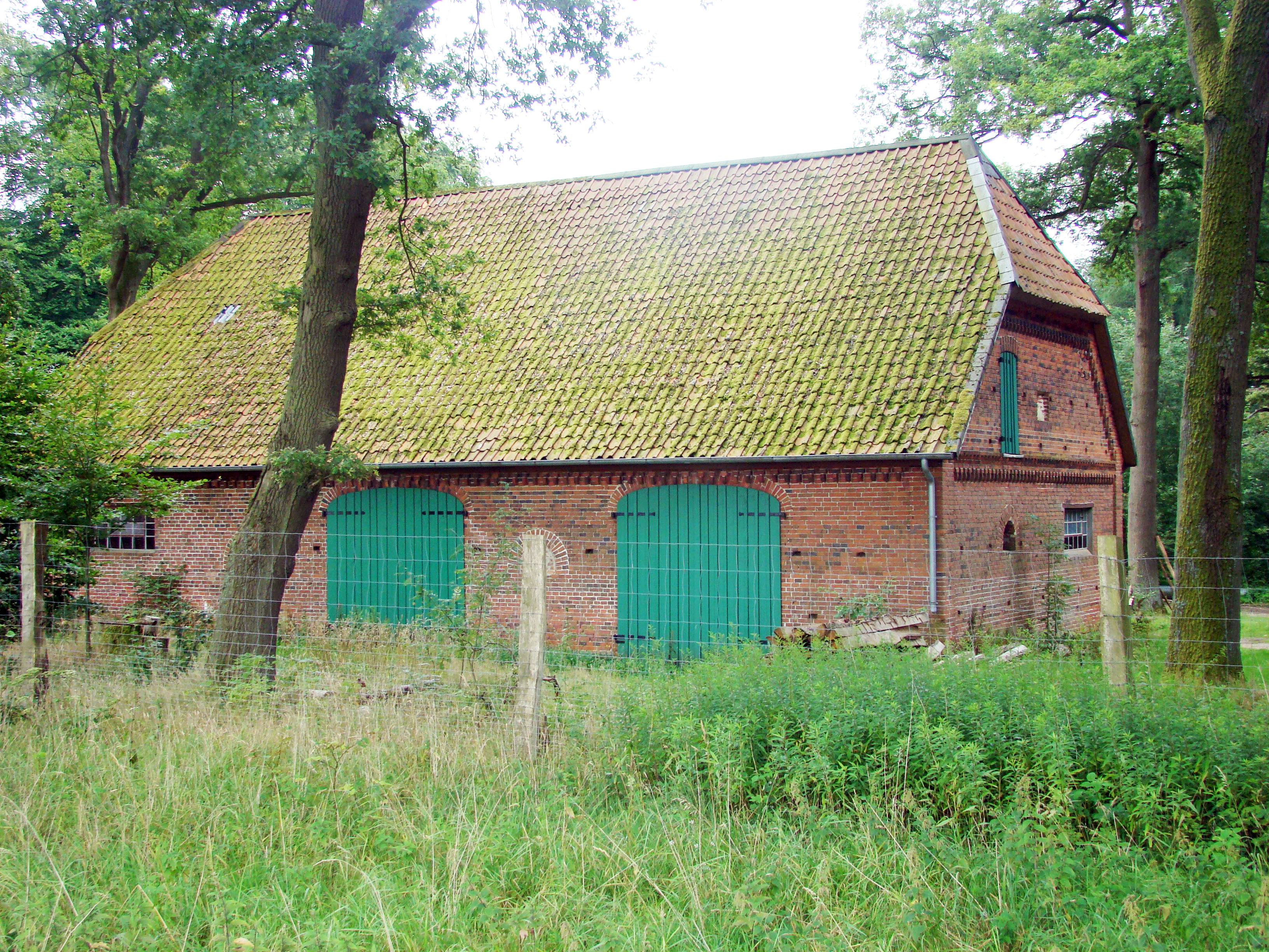 Gebäude des „Cohrs-Hofes“, im ehemaligen Ort Böstlingen, auf dem Truppen-Übungsplatz Bergen